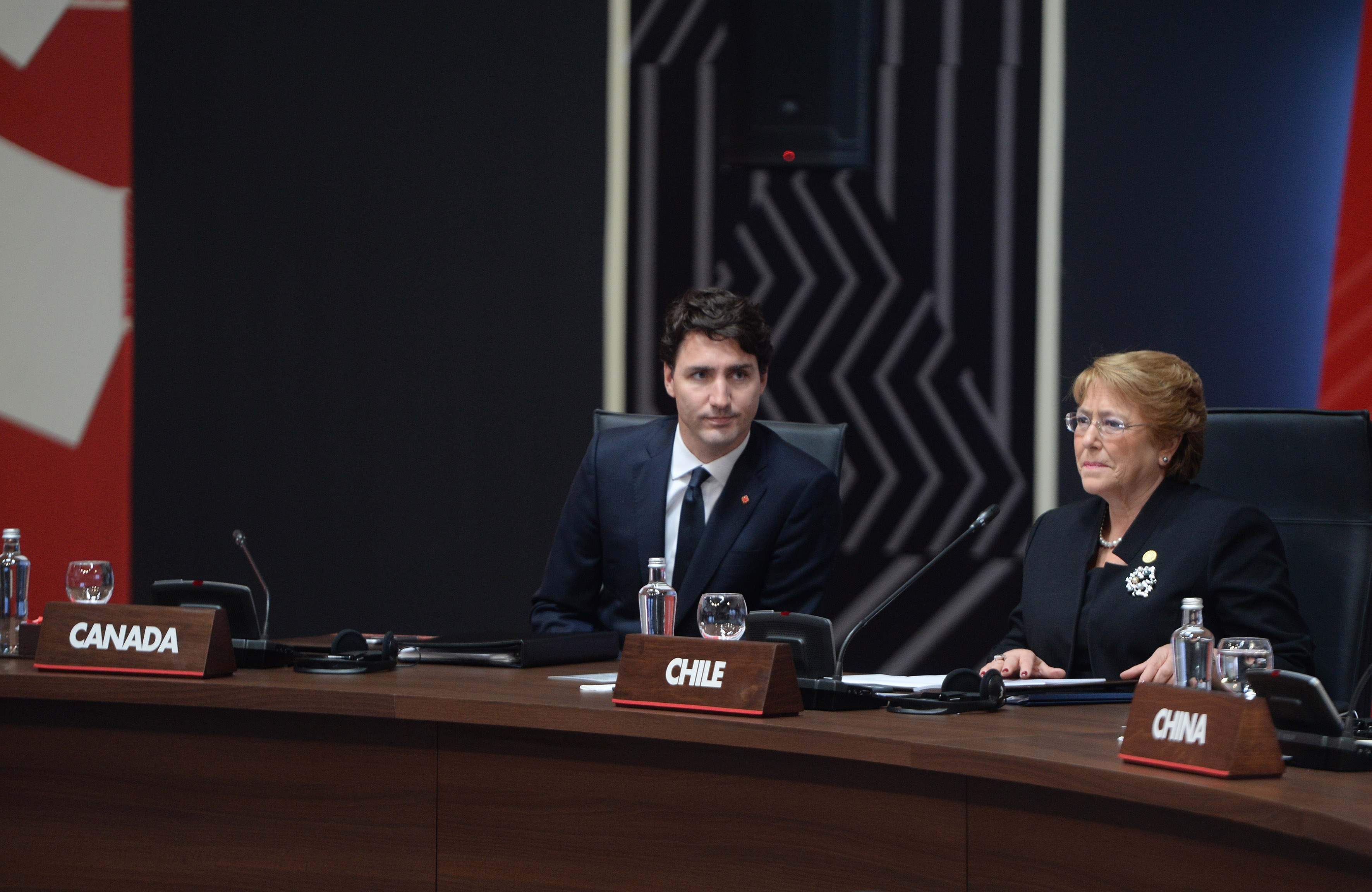 Gobierno de Chile